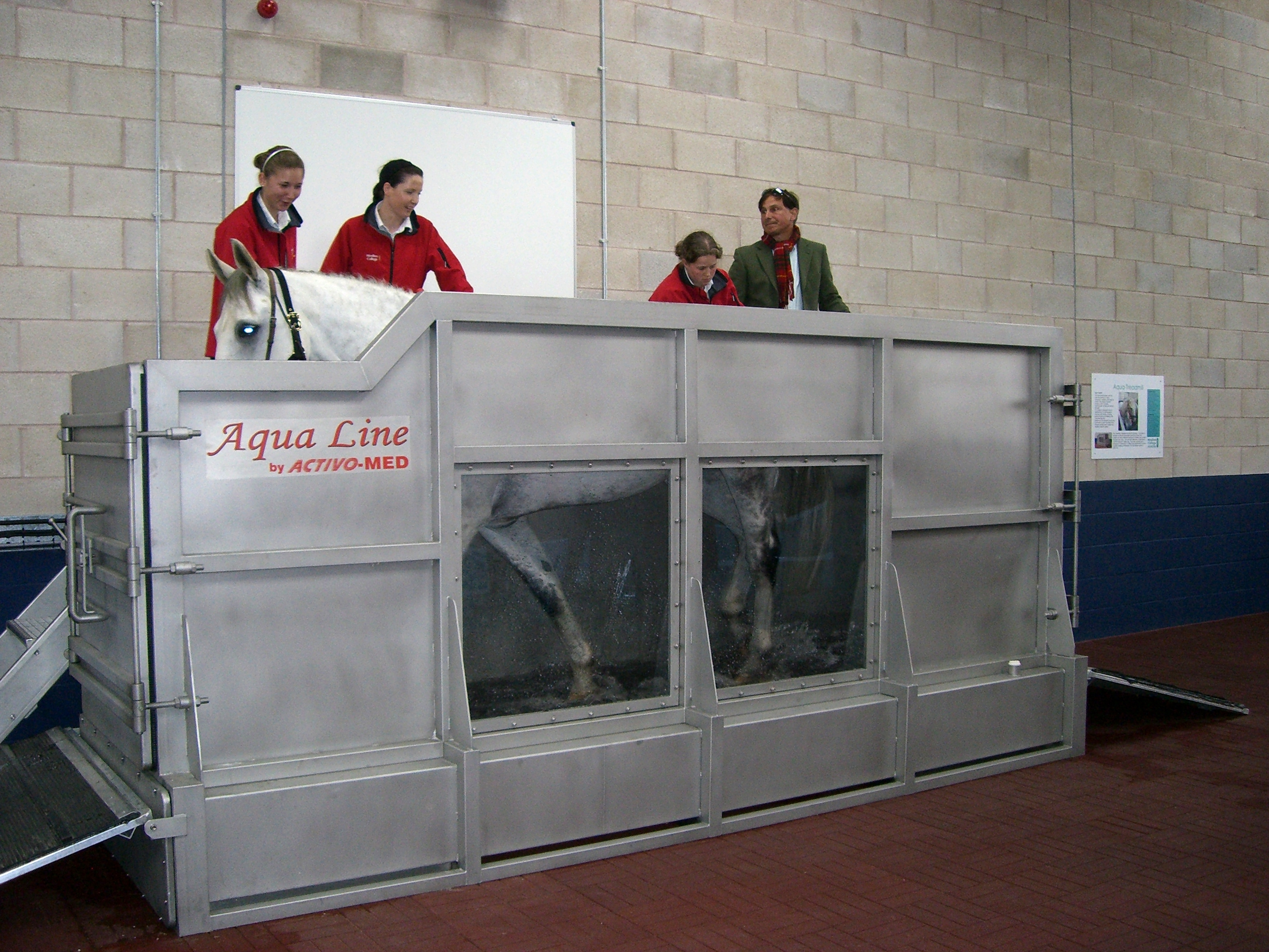 Aqua-Trainer